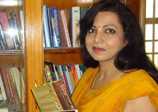 ಕನ್ನಡ: ಡಾ.ಲತಾ ರಾಜಶೇಖರ್